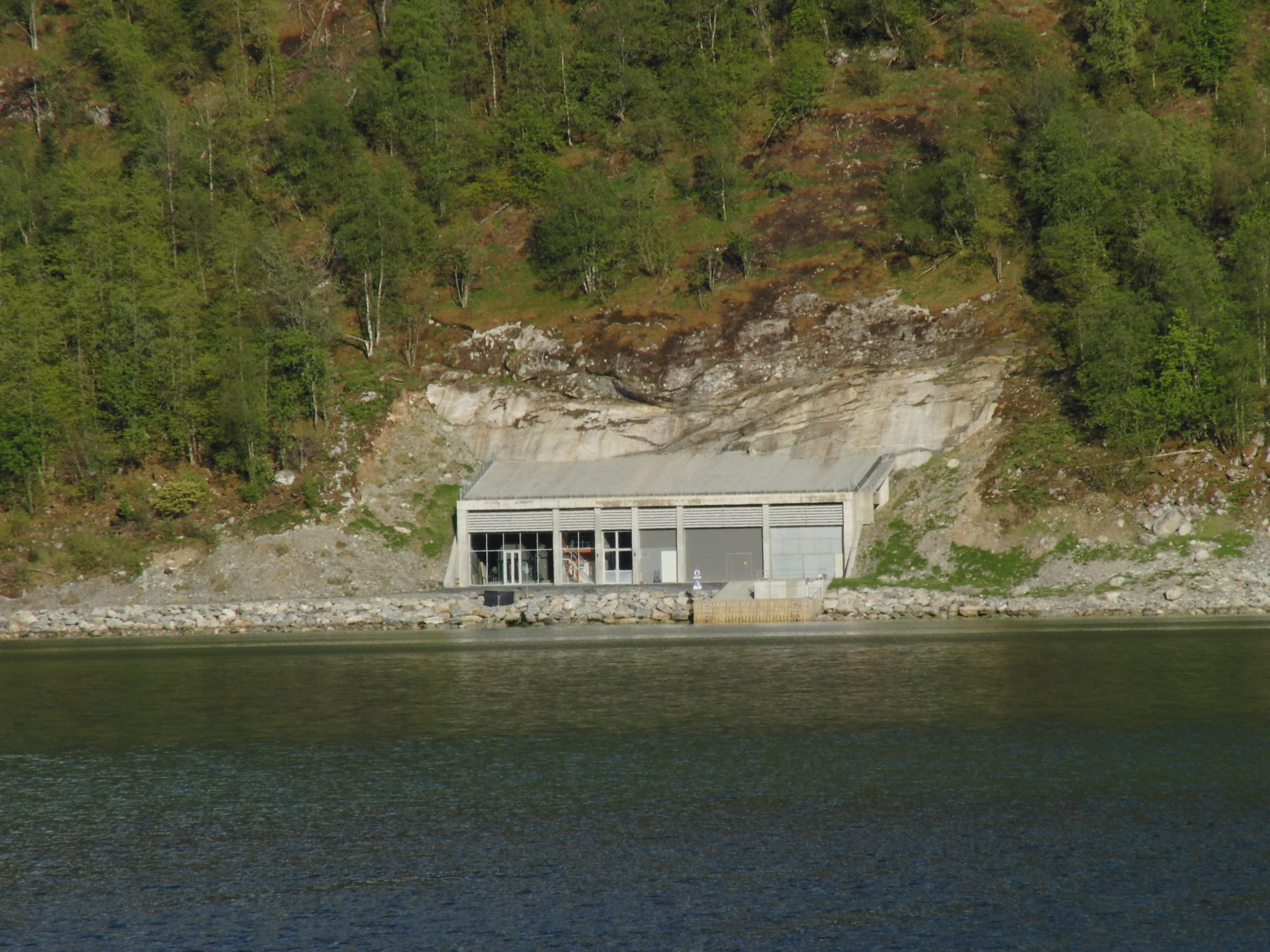 Lidal kraftverk